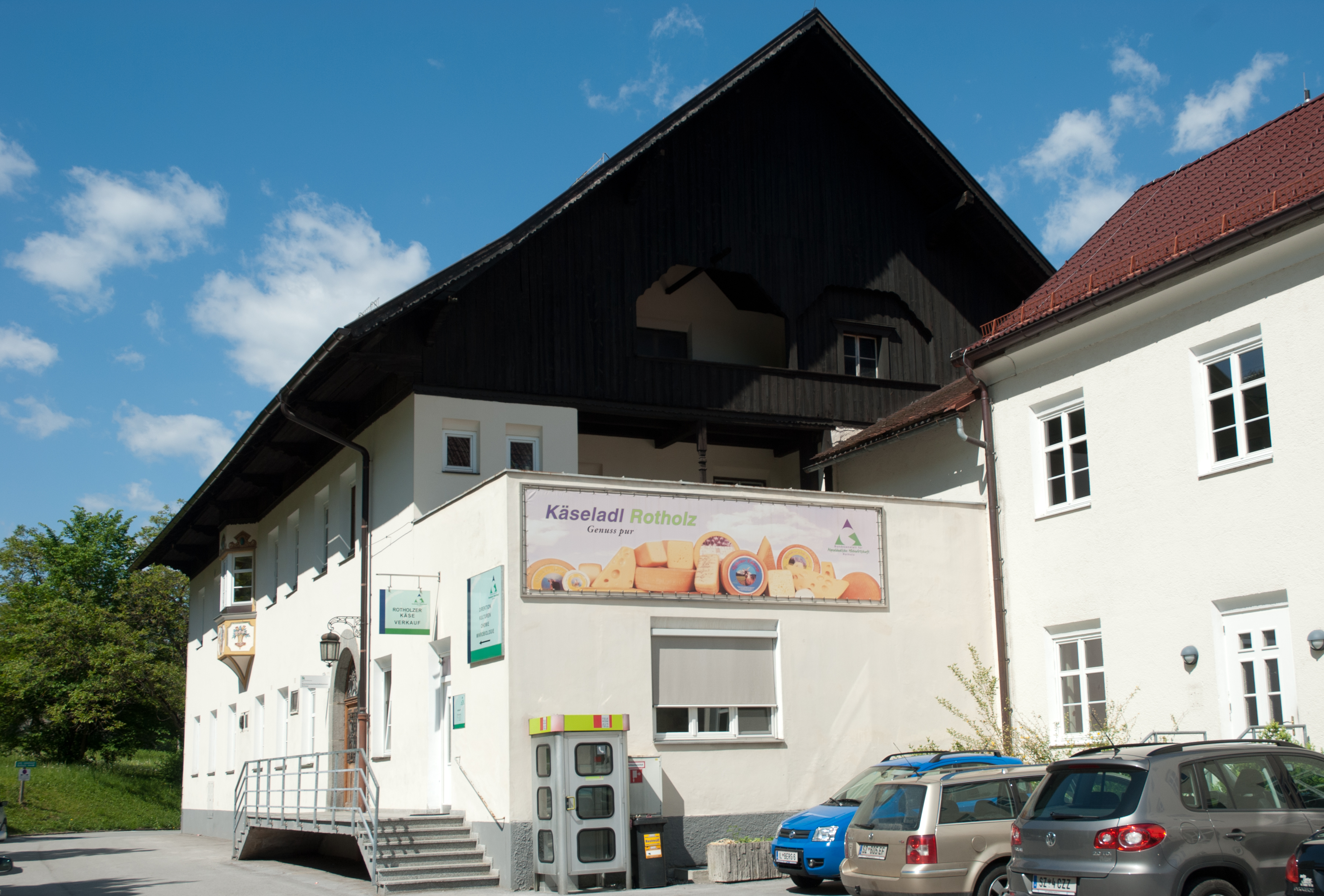 Landwirtschaftliche Lehranstalt Rotholz